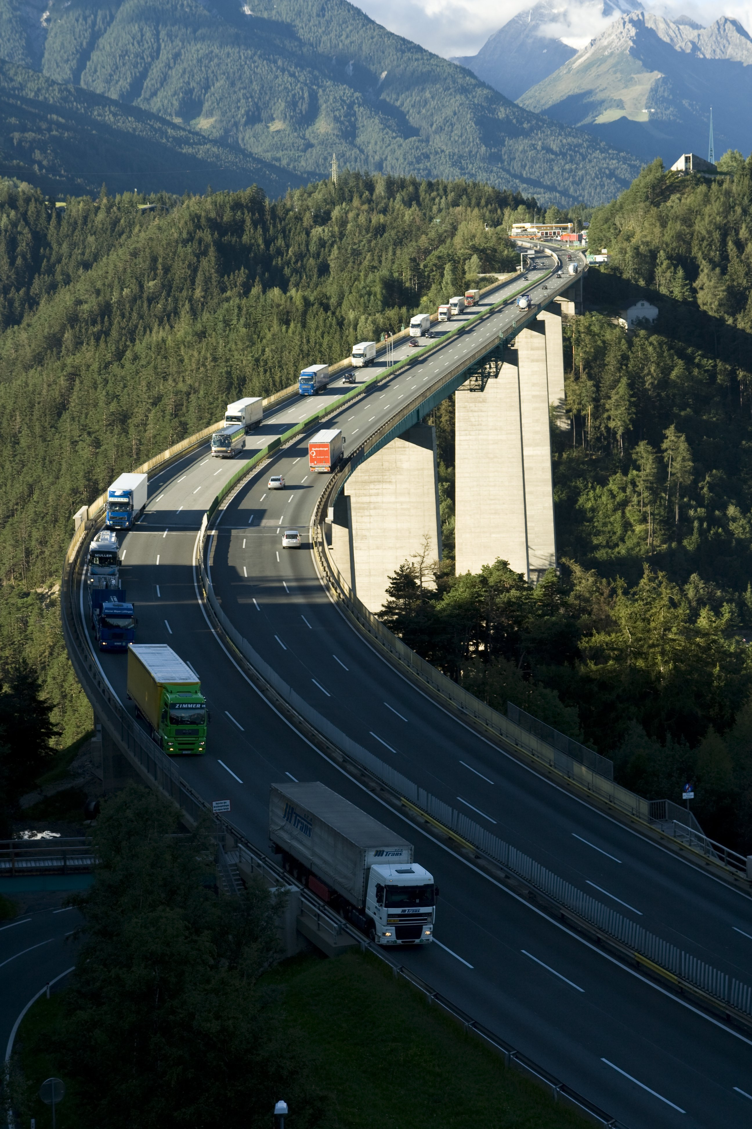 Europabrücke